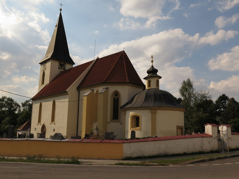 Kostel svatého Matěje, při západním okraji východního jádra obce, Horšice.